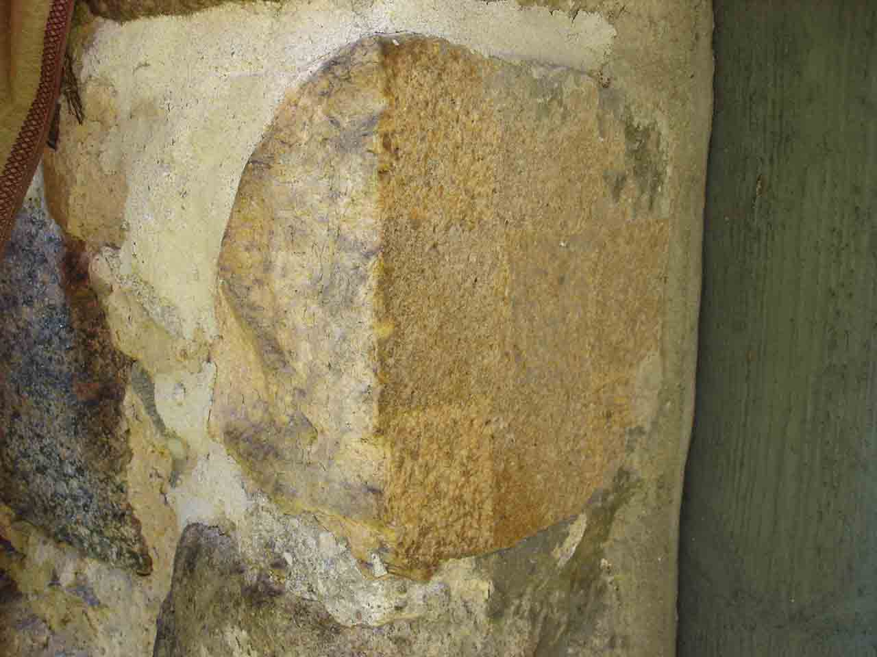 Nærbillede af skakbrætsten på Kemlitz kirke indvendigt i V-siden af den østligste portal på S-siden - stenen har kun mønster på én side